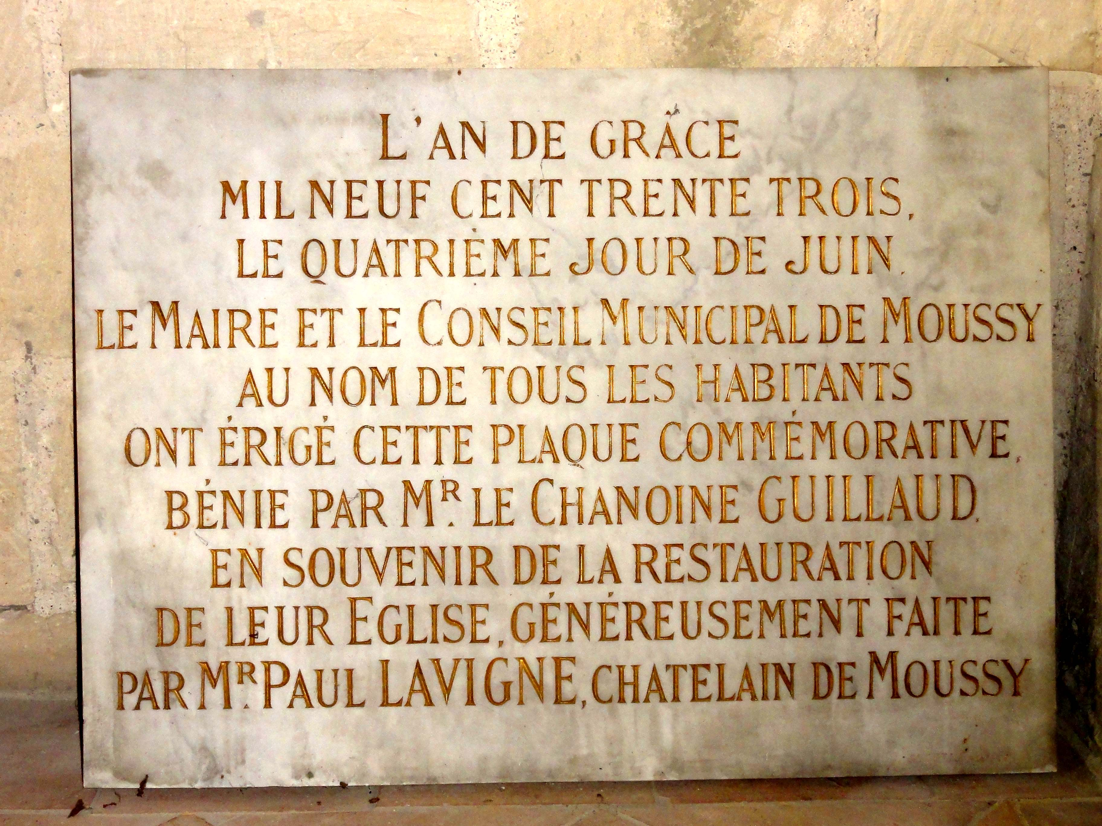 Mobilier de l'église - voir titre.